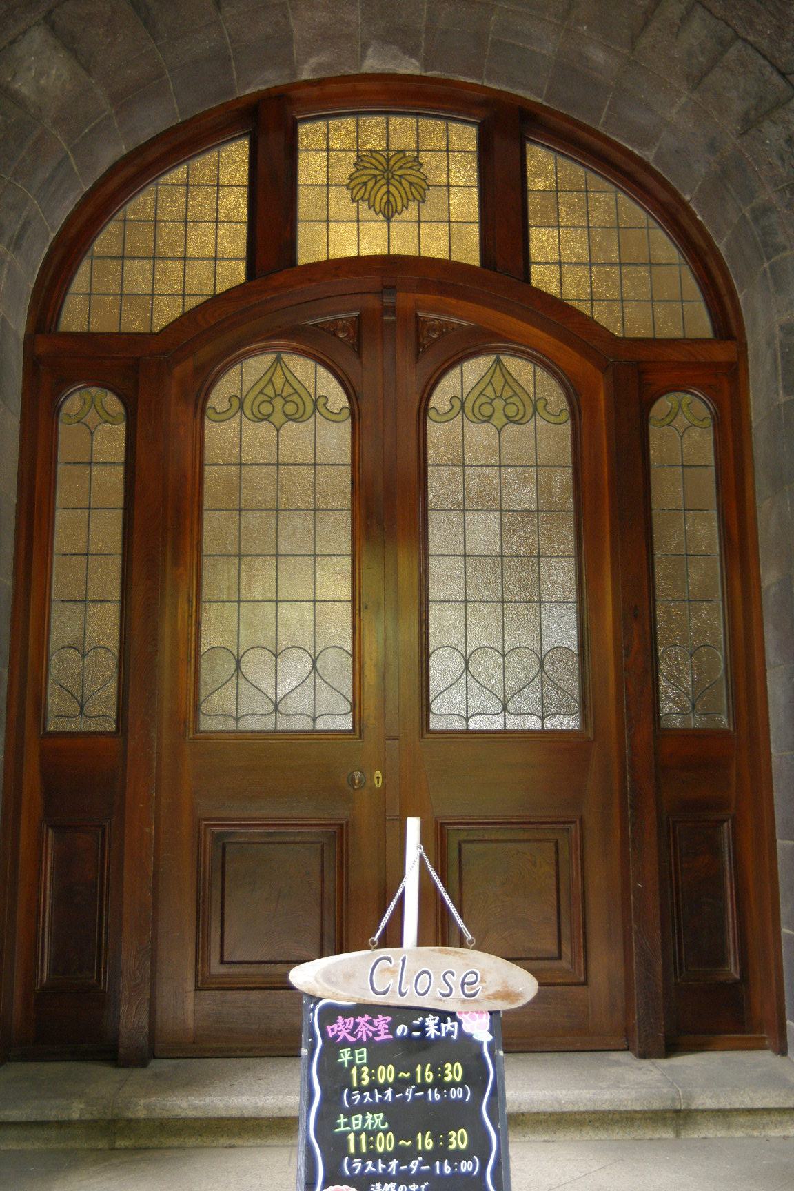 旧古河邸、入り口、ステンドグラス。